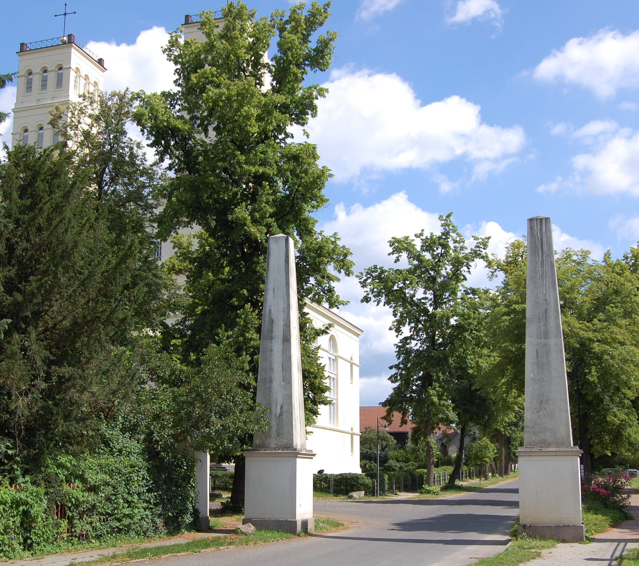 Obelisken an der Ausfahrt aus dem Schlossbereich Straupitz, im Hintergrund die Dorfkirche Straupitz